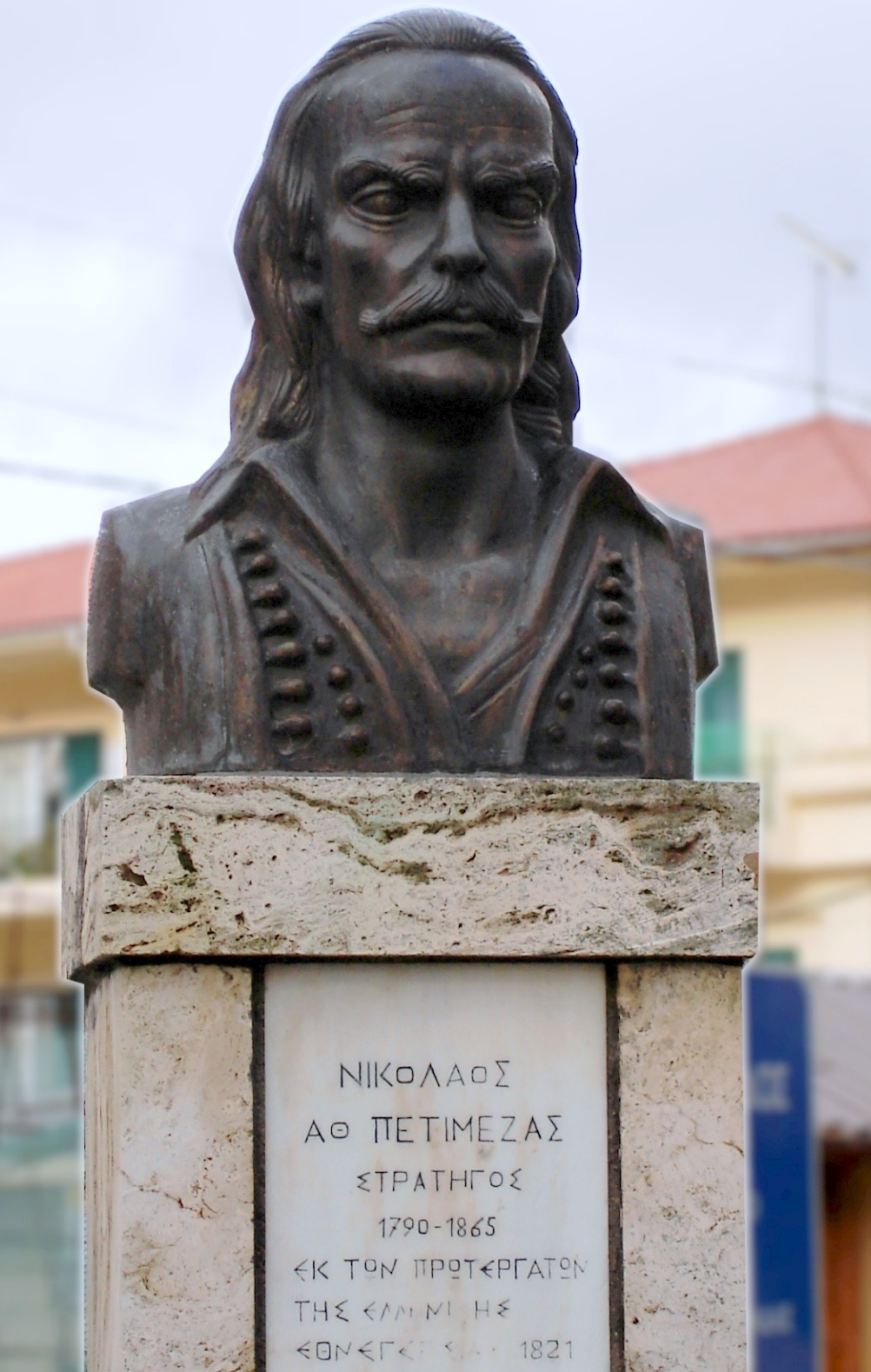 Νικόλαος Πετιμεζάς αγωνιστής του 1821